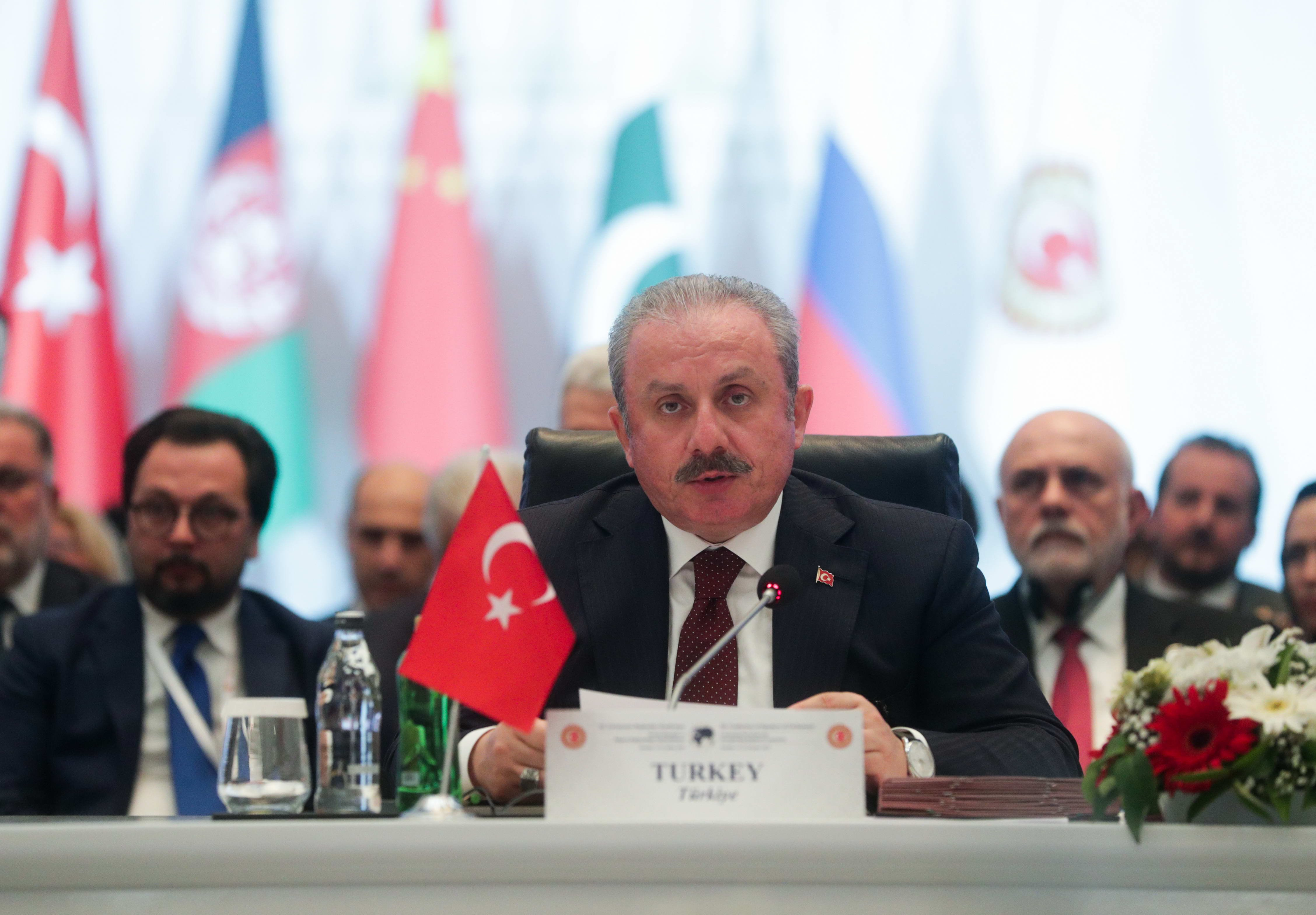 Мустафа Шентоп (род.1968) — турецкий политик.